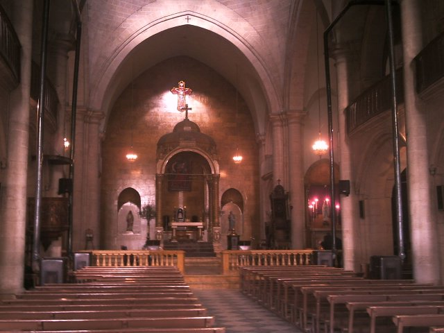 Aleppo, Syria.